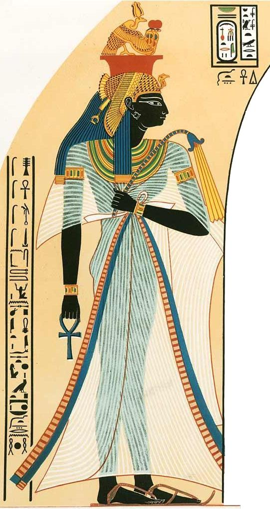 Královna Ahmose Nefertari, 18. dynastie